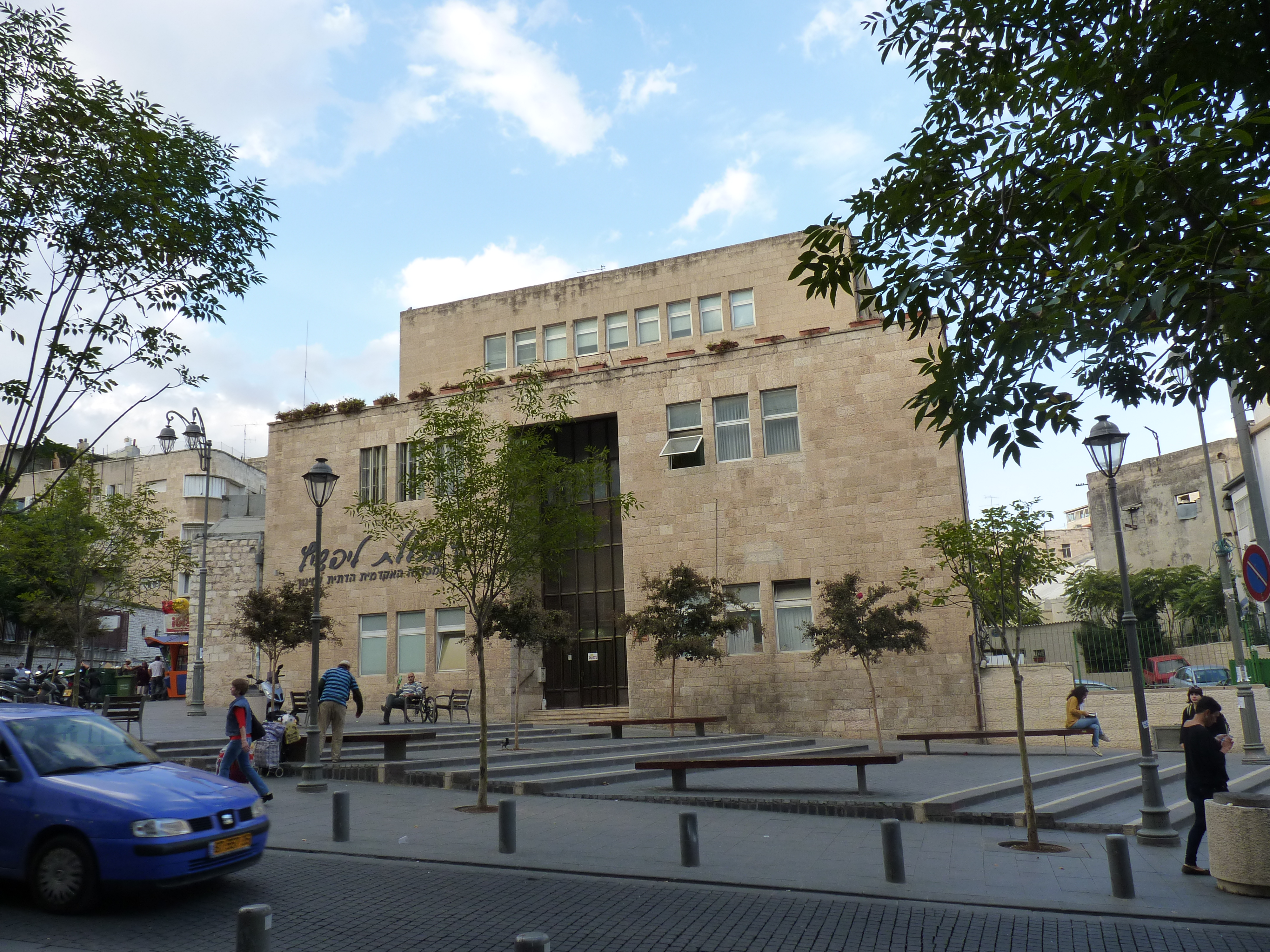 Jerusalem, Menache H. Eliachar square, Hillel street, Lifshits College, P1100771 Jerusalem